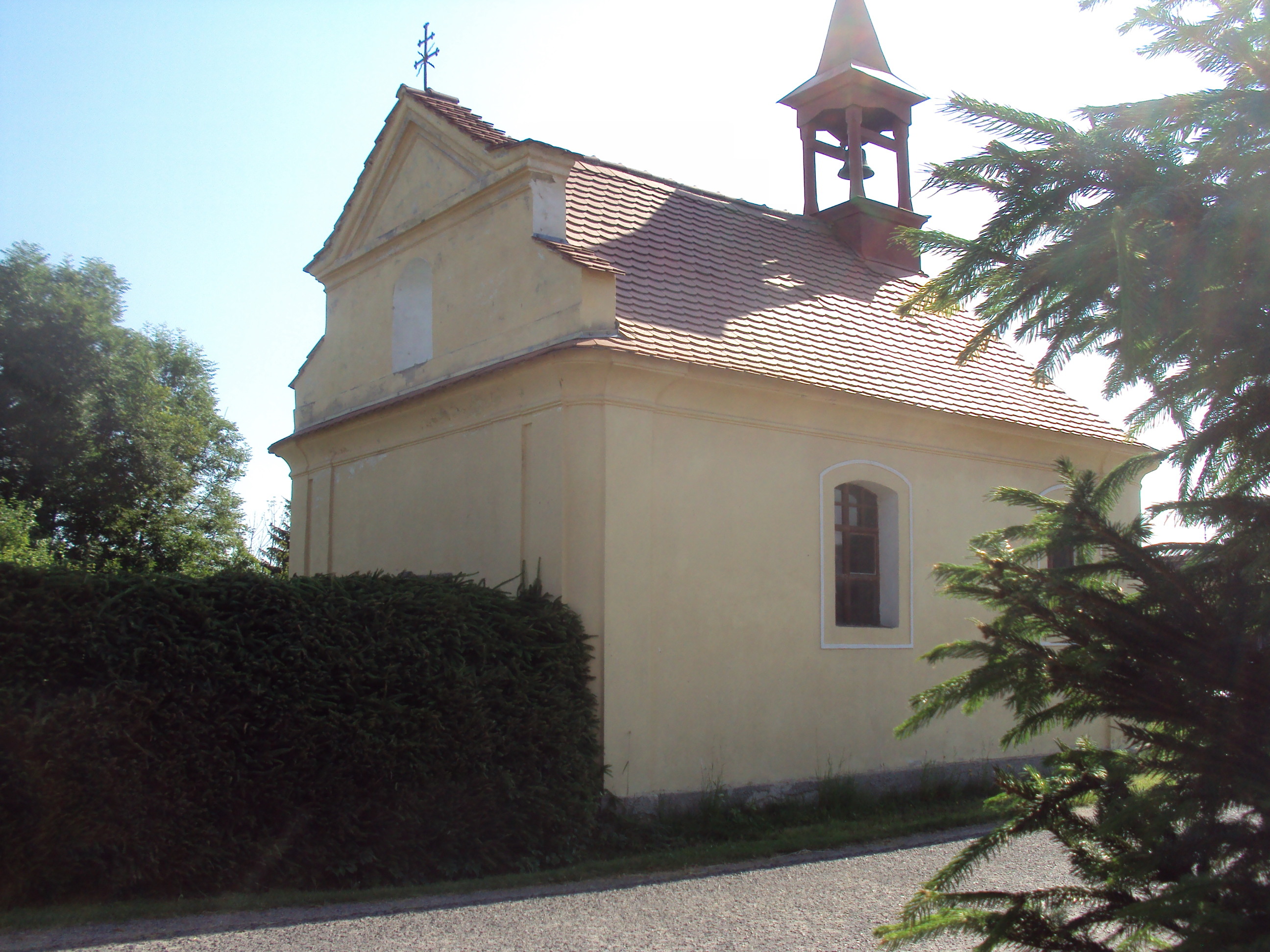 Kaple v Borku